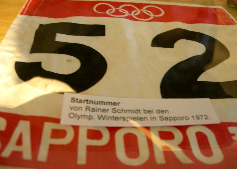 Olympische Winterspiele 1972 - Startnummer von Rainer Schmidt. Eigenes Foto, gemacht im Thüringer Wintersportmuseum in Oberhof.